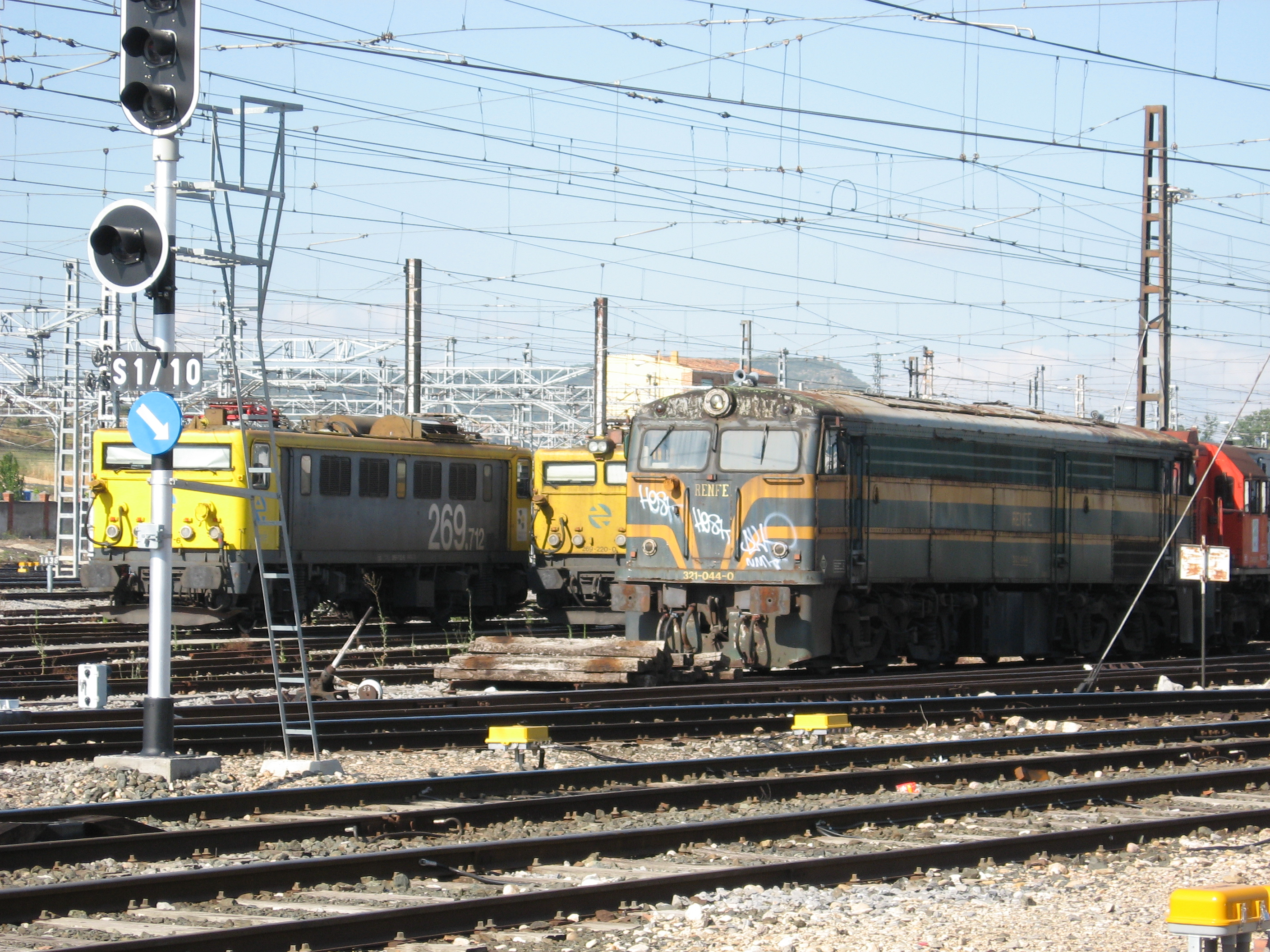 Desc: 321-044 y varias 269 en la estación del ferrocarril de Miranda de Ebro